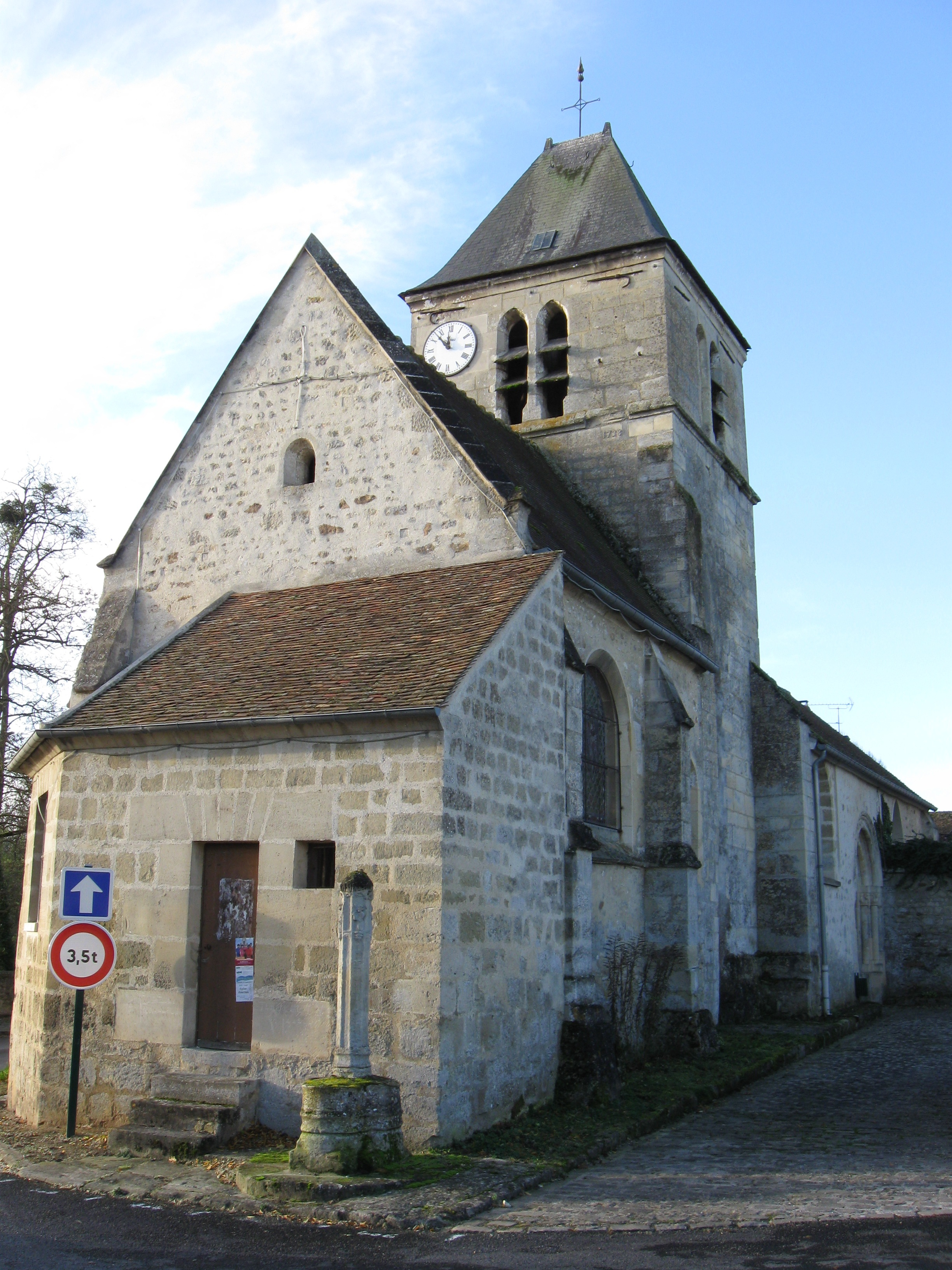 Église Sainte-Marie-Madeleine (Le Perchay; département du Val-d'Oise, région Île-de-France).